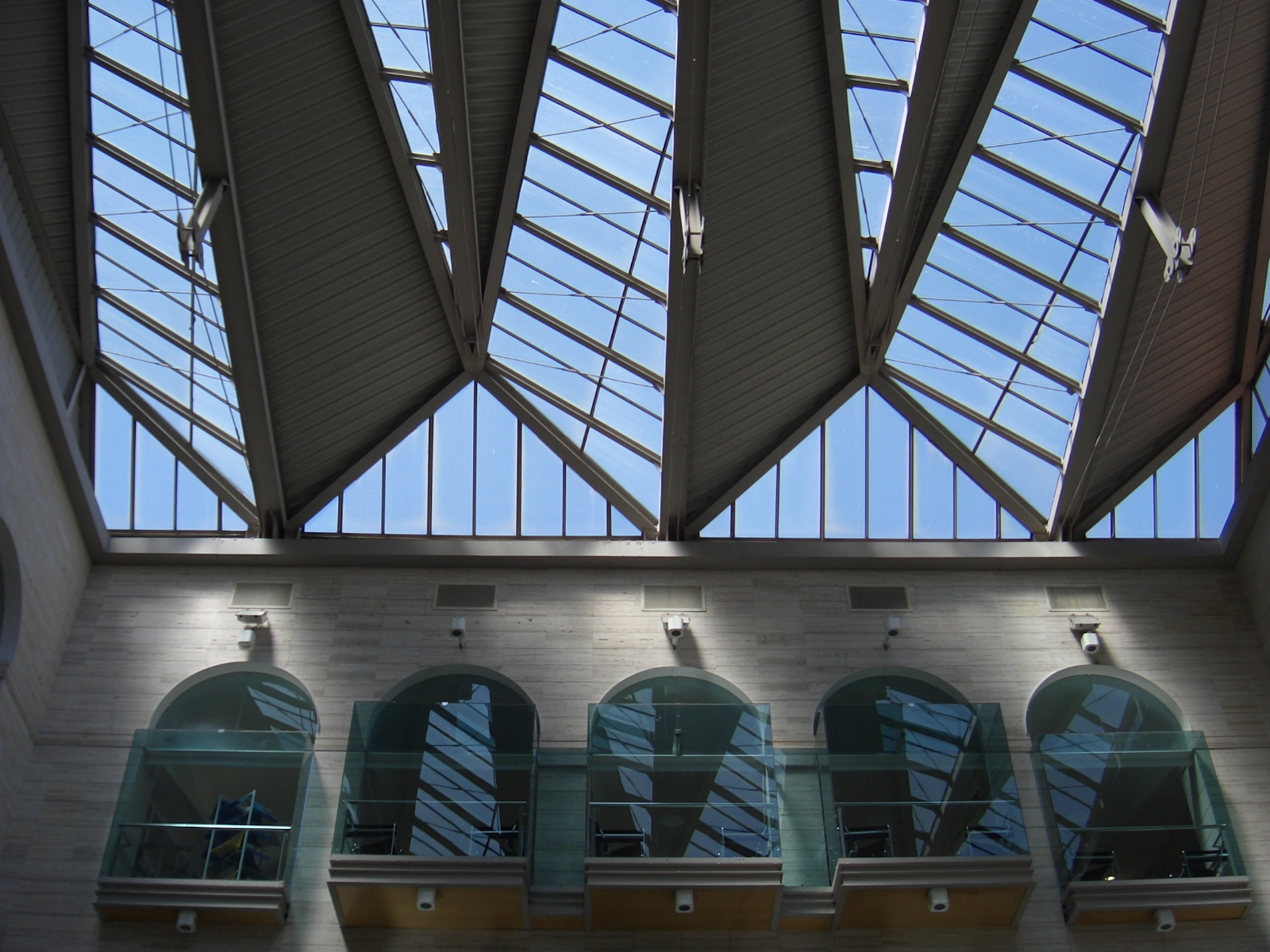 Detall de la coberta de la Biblioteca Pública de Lleida